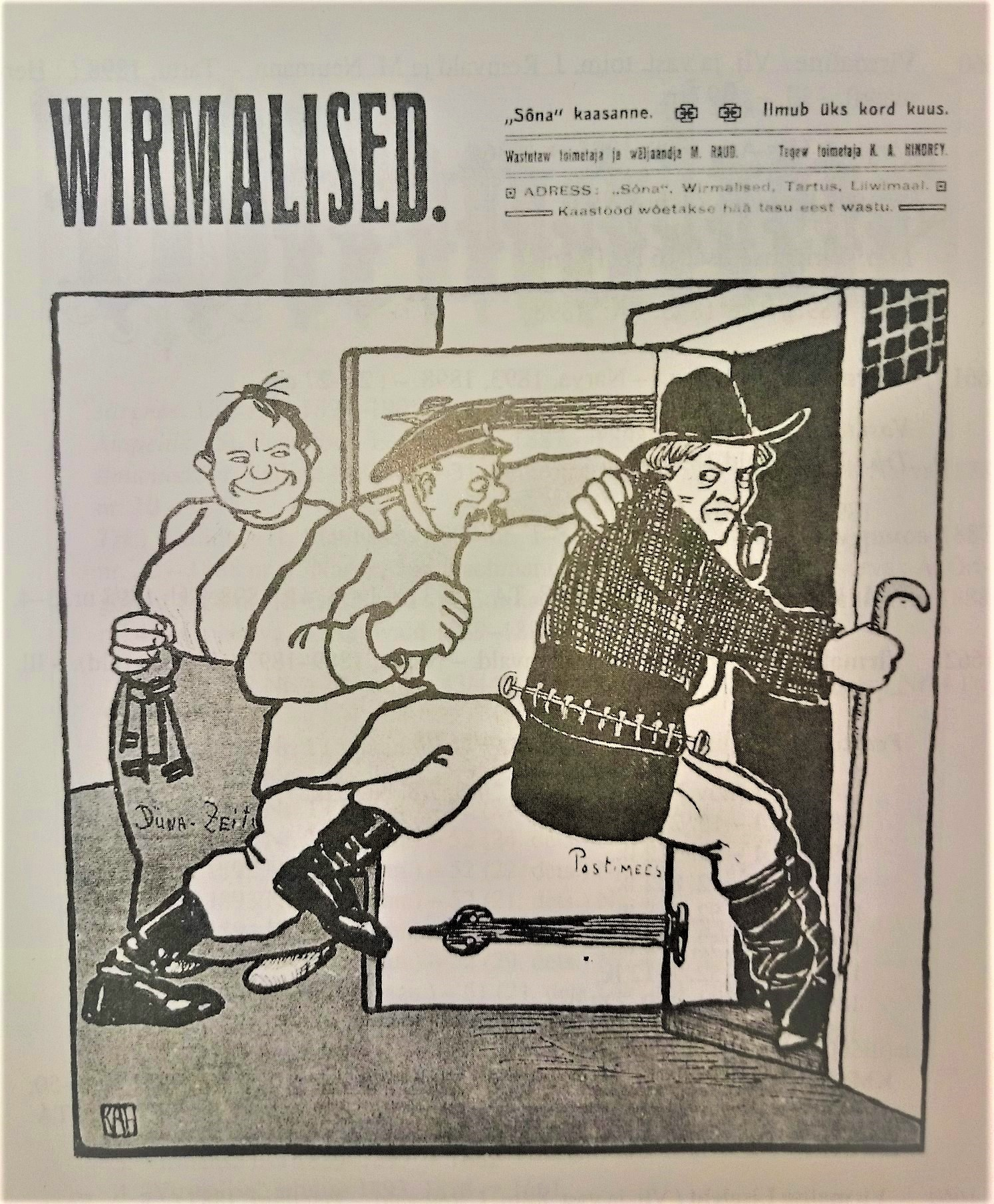 Wirmalised, esikaanepilt